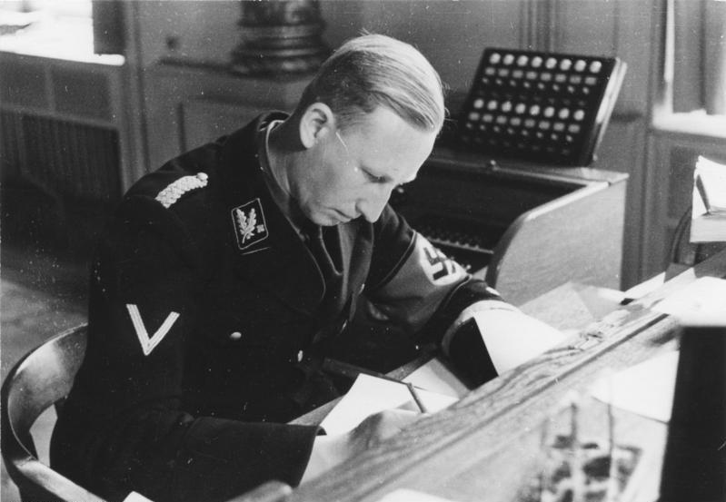 Reinhard Heydrich München.- SS-Brigadeführer und Leiter der bayerischen Polizei Reinhard Heydrich in seinem Büro am Schreibtisch sitzend; 1934 Abgebildete Personen: Heydrich, Reinhard: SS-Obergruppenführer, Leiter des SD, Chef des Reichssicherheitshauptamtes (RSHA), Deutschland (GND 118550640)